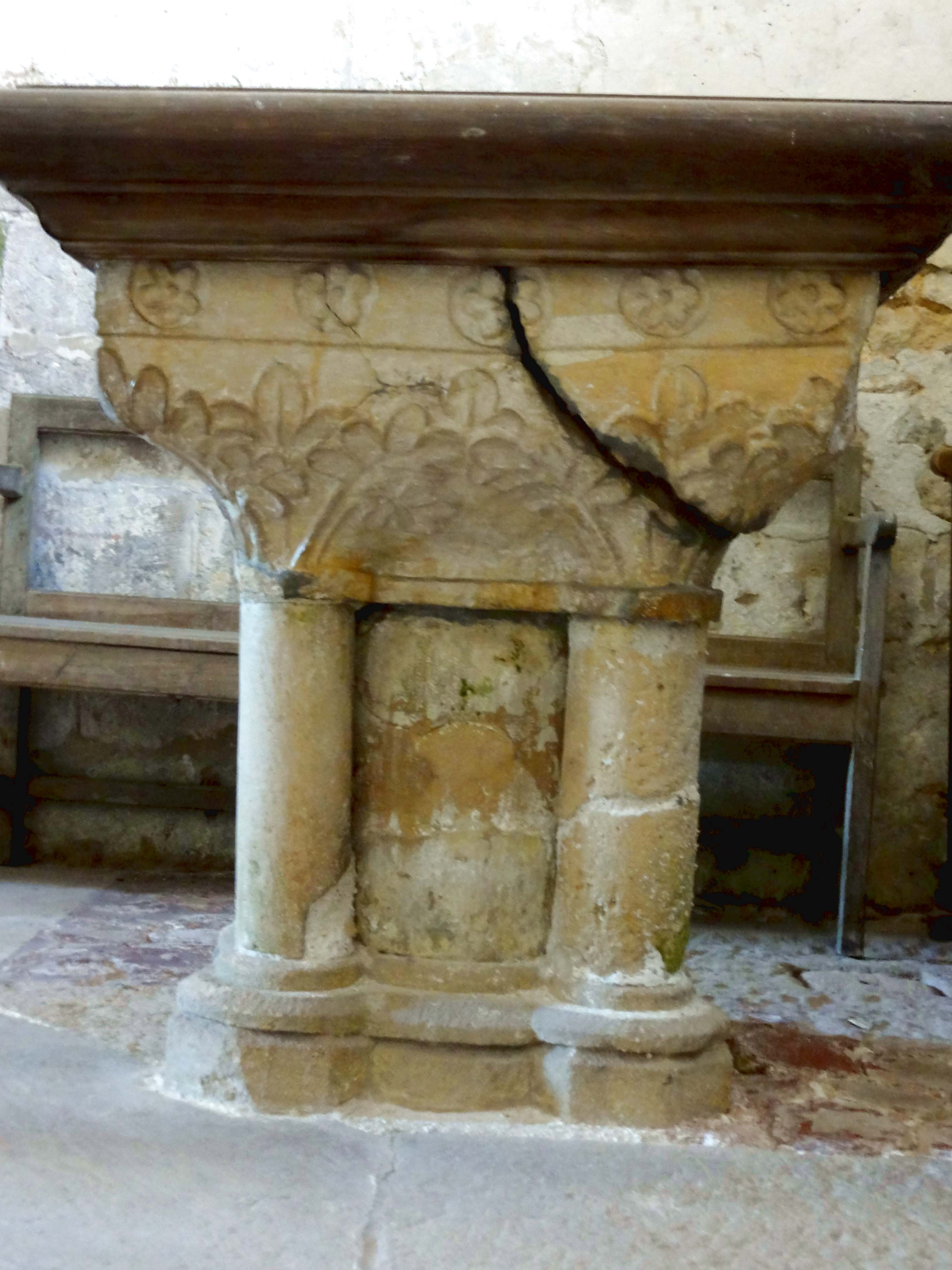 Mobilier de l'église - voir titre.